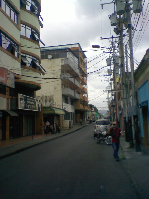 Vista de la Calle Sucre en el centro de San Juan de los Morros